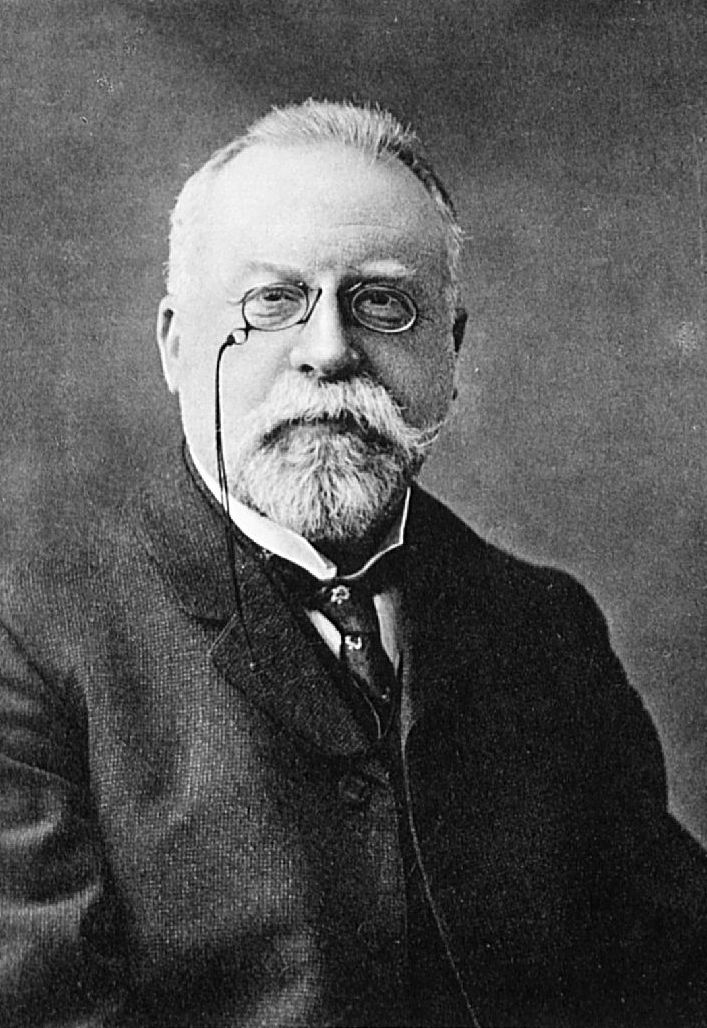 Viktor Ehrenberg (1851-1929), deutscher Jurist